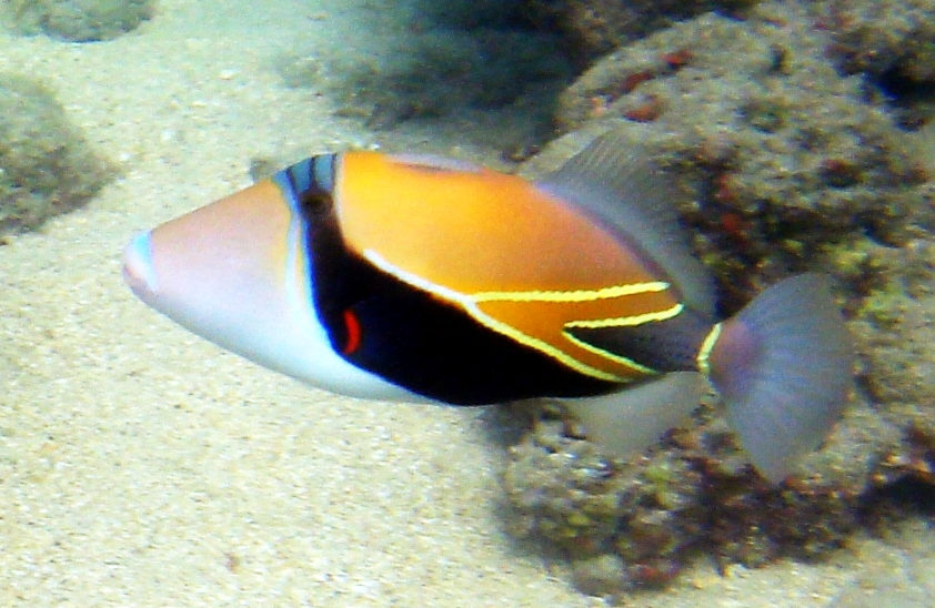 Reef Triggerfish (Rhinecanthus rectangulus, Hawaiian: humuhumunukunukuāpua'a) in Hanauma Bay, Hawaii